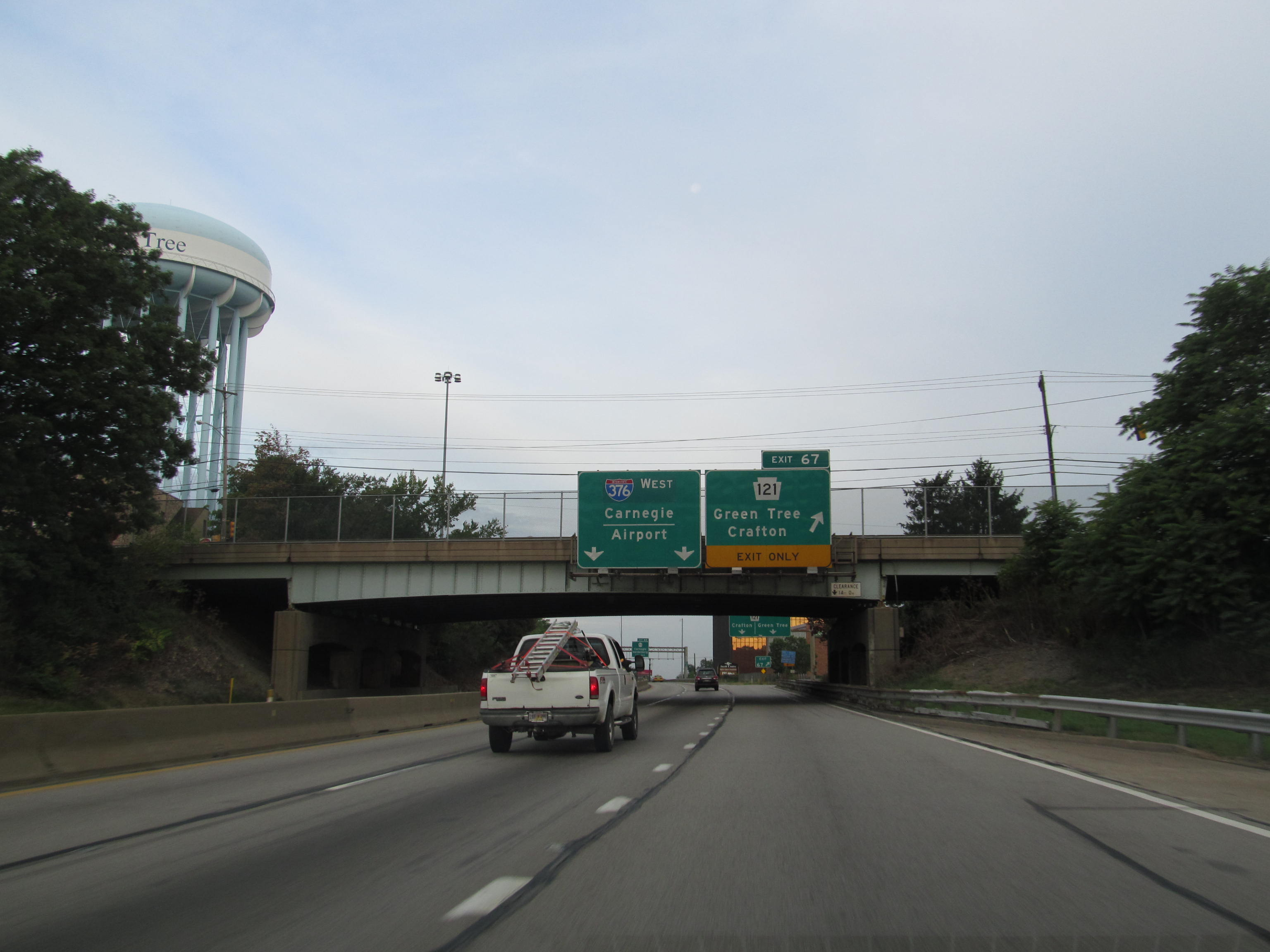 Interstate 376 - Pennsylvania